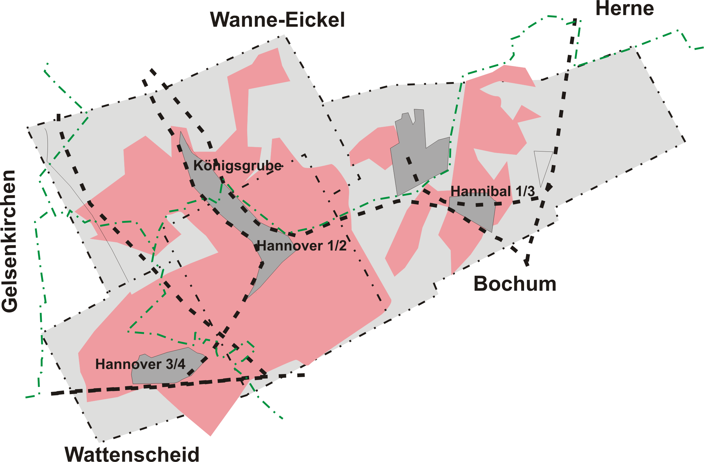 Grubenfeld des Zechenverbundes Hannover-Hannibal-Königsgrube